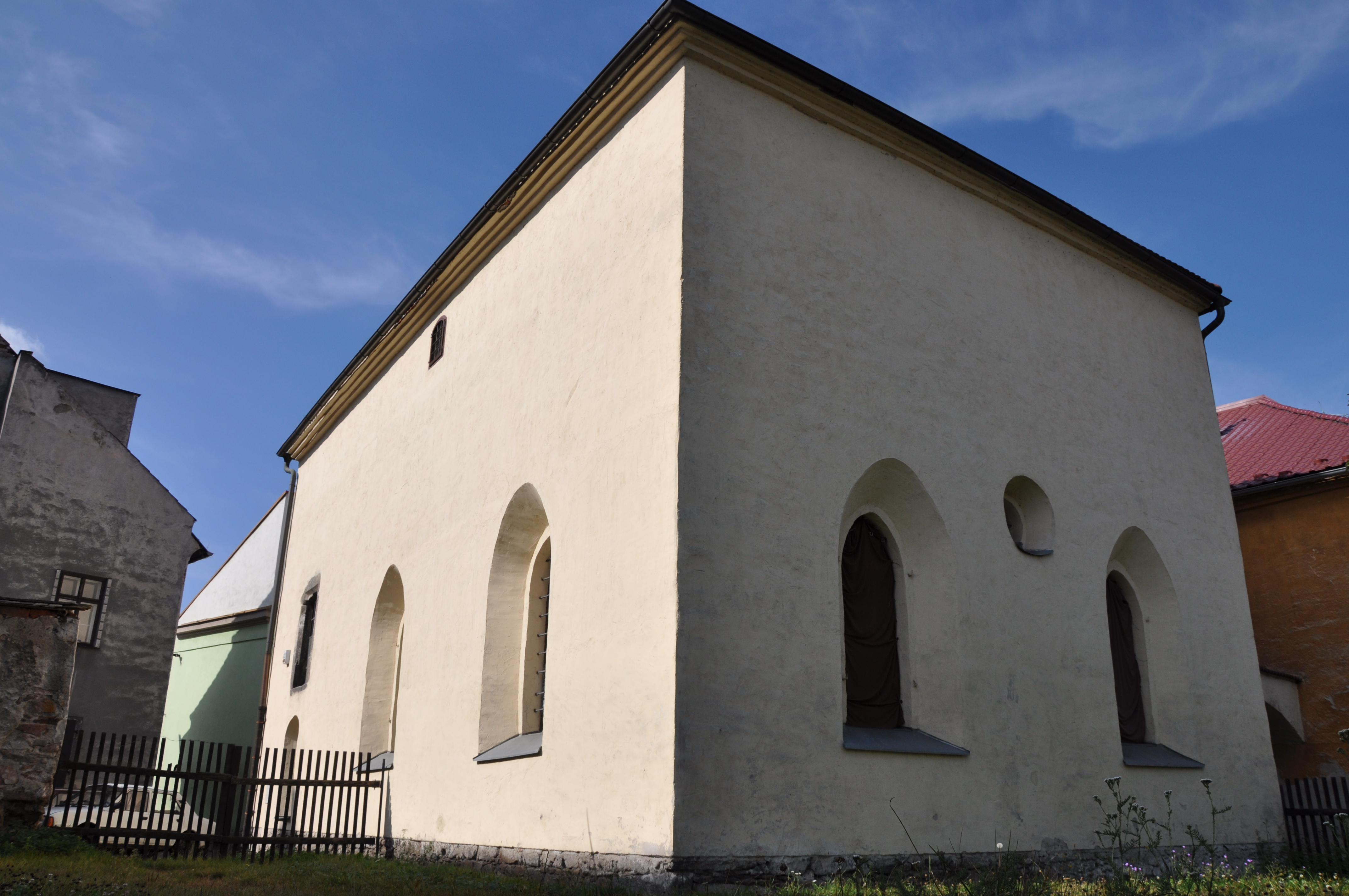 Stará synagoga ve Velkém Meziříčí